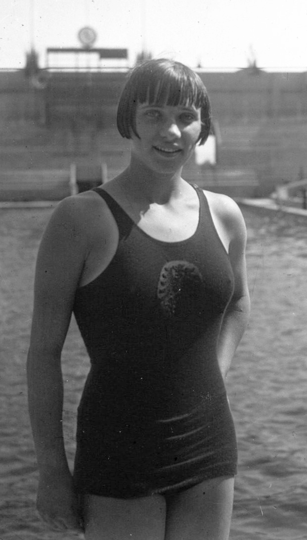 Les Tourelles : Championnats d'Europe : plongeon, Melle Jordan, gagnante (portrait à 3 m) : [photographie de presse] / Agence Meurisse